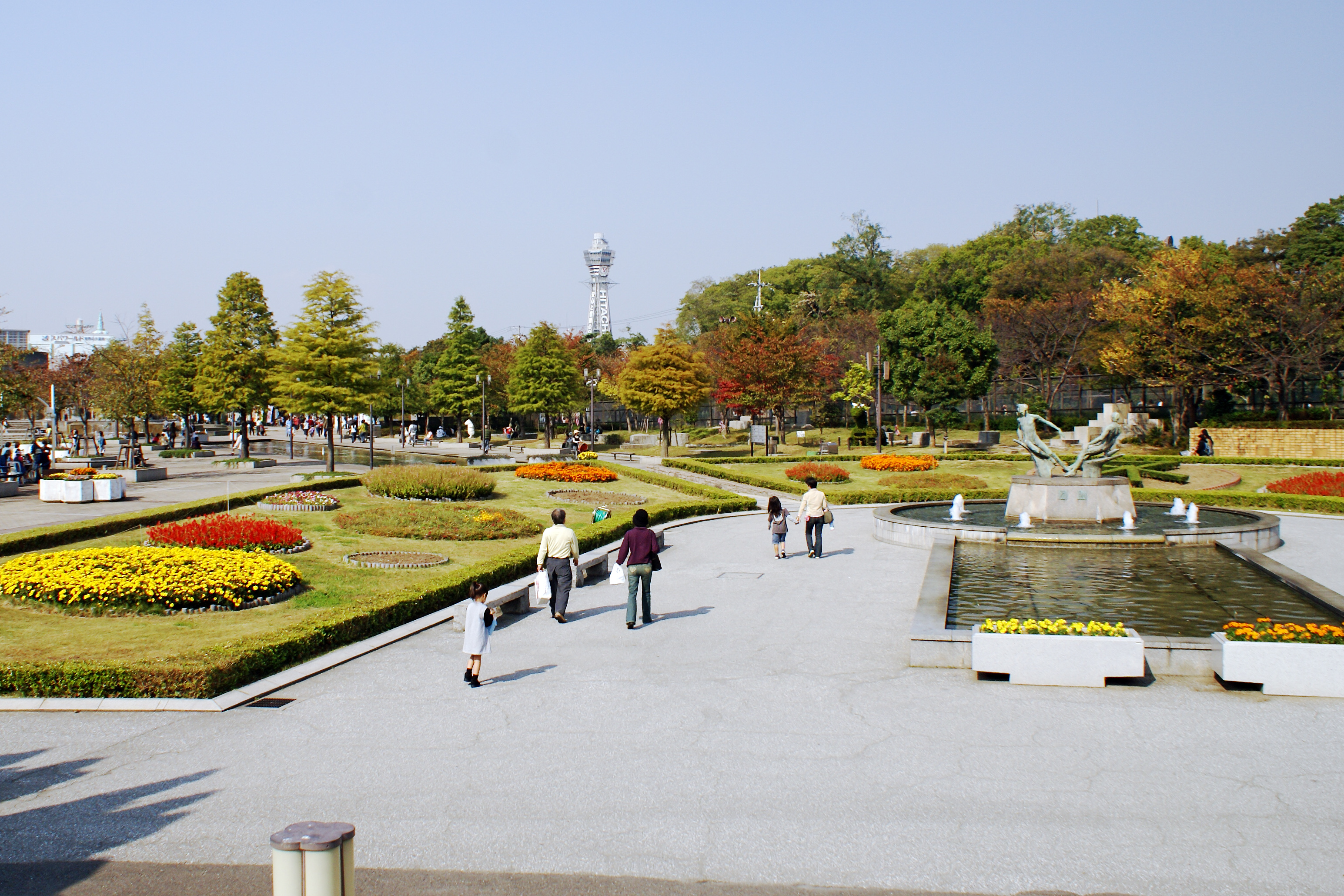 Tennoji Park in Osaka, Osaka prefecture, Japan